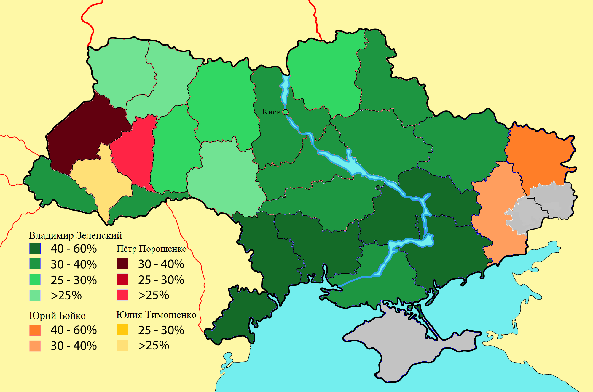 Карта предварительных результатов выборов в Украине 31 марта 2019 года